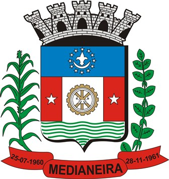 Brasão de Armas do município paranaense de Medianeira, Brasil.